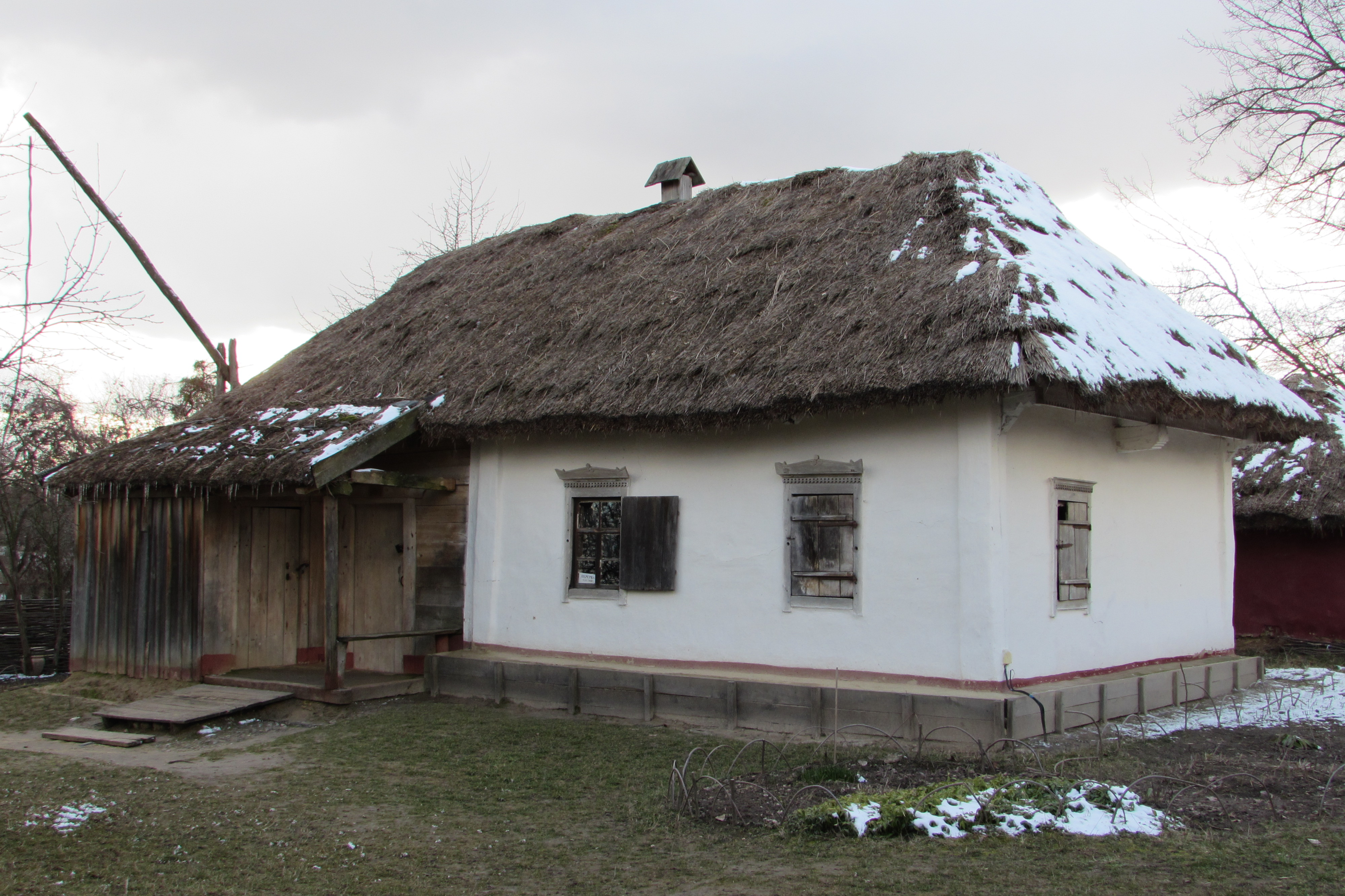 Хата з села Велика Павлівка Зіньківського району Полтавської області, Київ, Пирогів